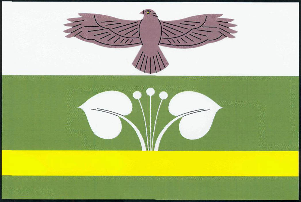 Vlajka obce Kanina